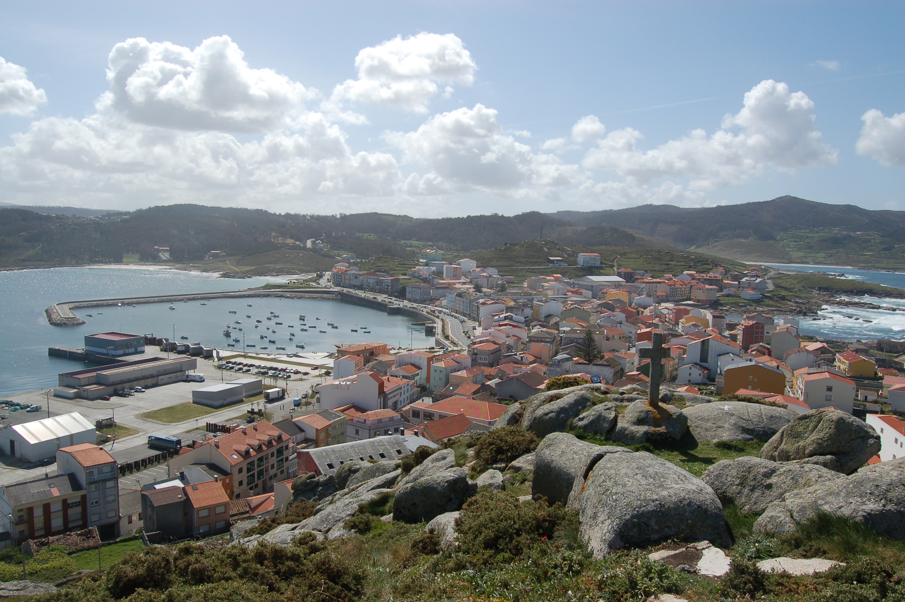 Vista de Muxía desde o monte do Corpiño